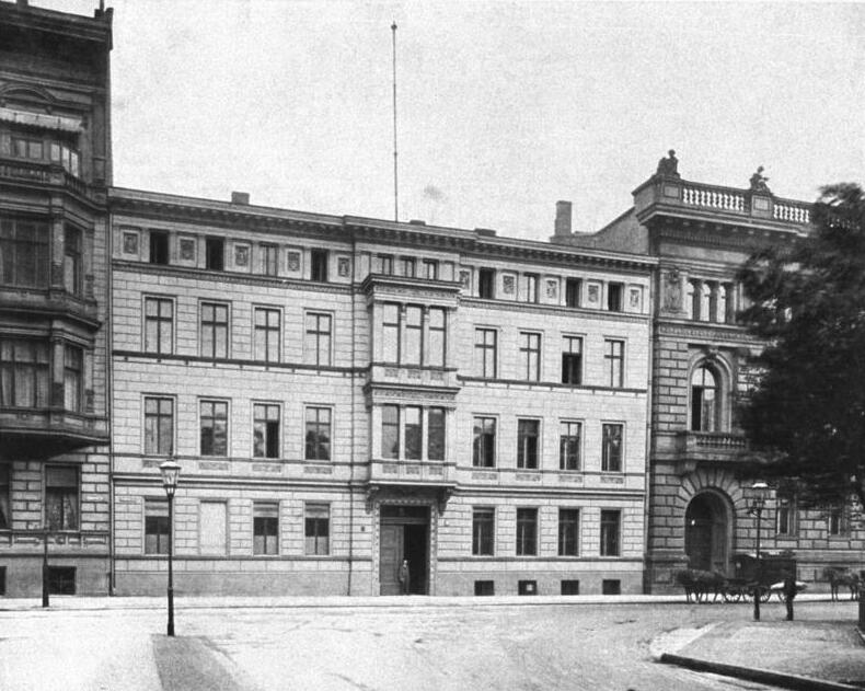 Das Dienstgebäude des Reichs-Versicherungsamts in Berlin, Wilhelmplatz 2 (von 1887 bis 1894)